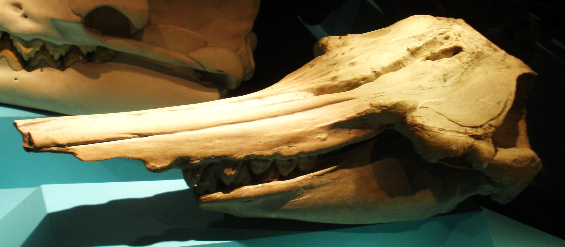 Fossil of Squalodon, an extinct whale Took the photo at Musee d'Histoire Naturelle, Brussels